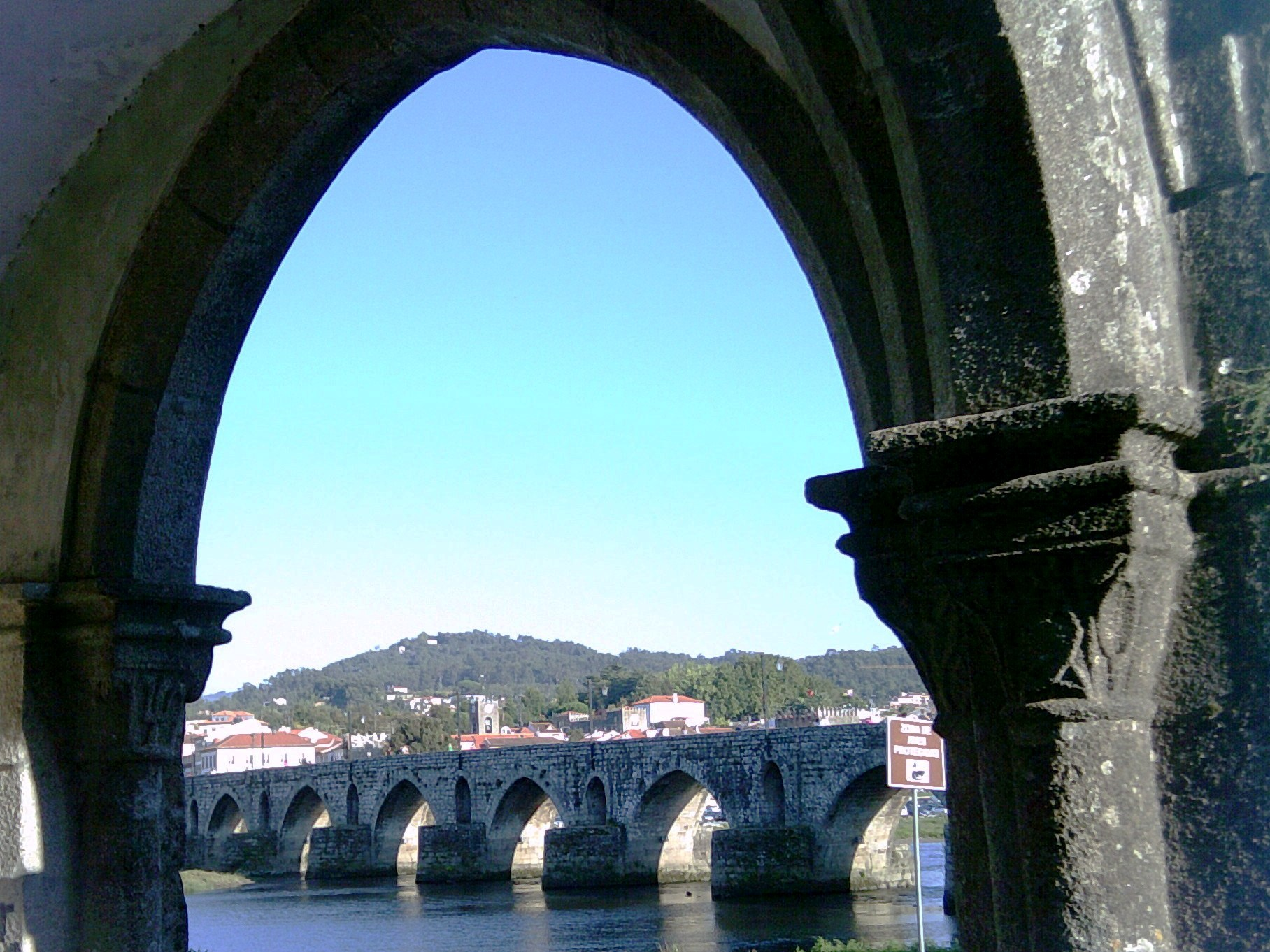 Ponte Velha sobre o rio Lima, freguesia e vila de Ponte de Lima, distrito de Viana de Castelo, Portugal: vista a partir da Capela do Anjo da Guarda.